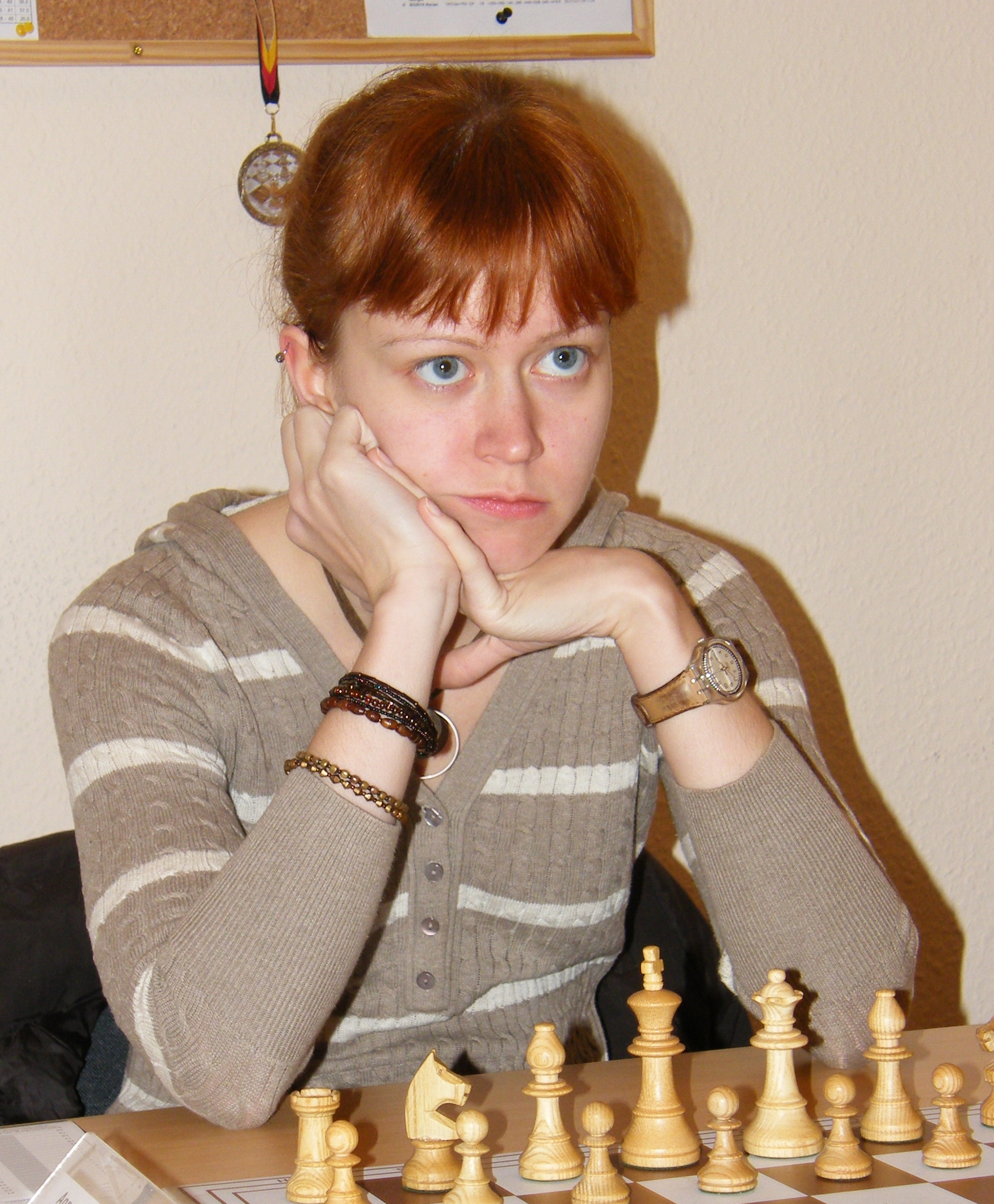 Anna Burtasova bei einem Wettkampf der Frauenbundesliga in Berlin-Pankow